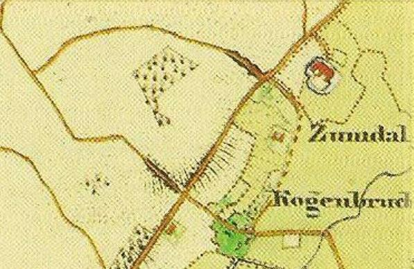 Preußische Kartenaufnahme 1846 - Uraufnahme - (5002 Geilenkirchen)